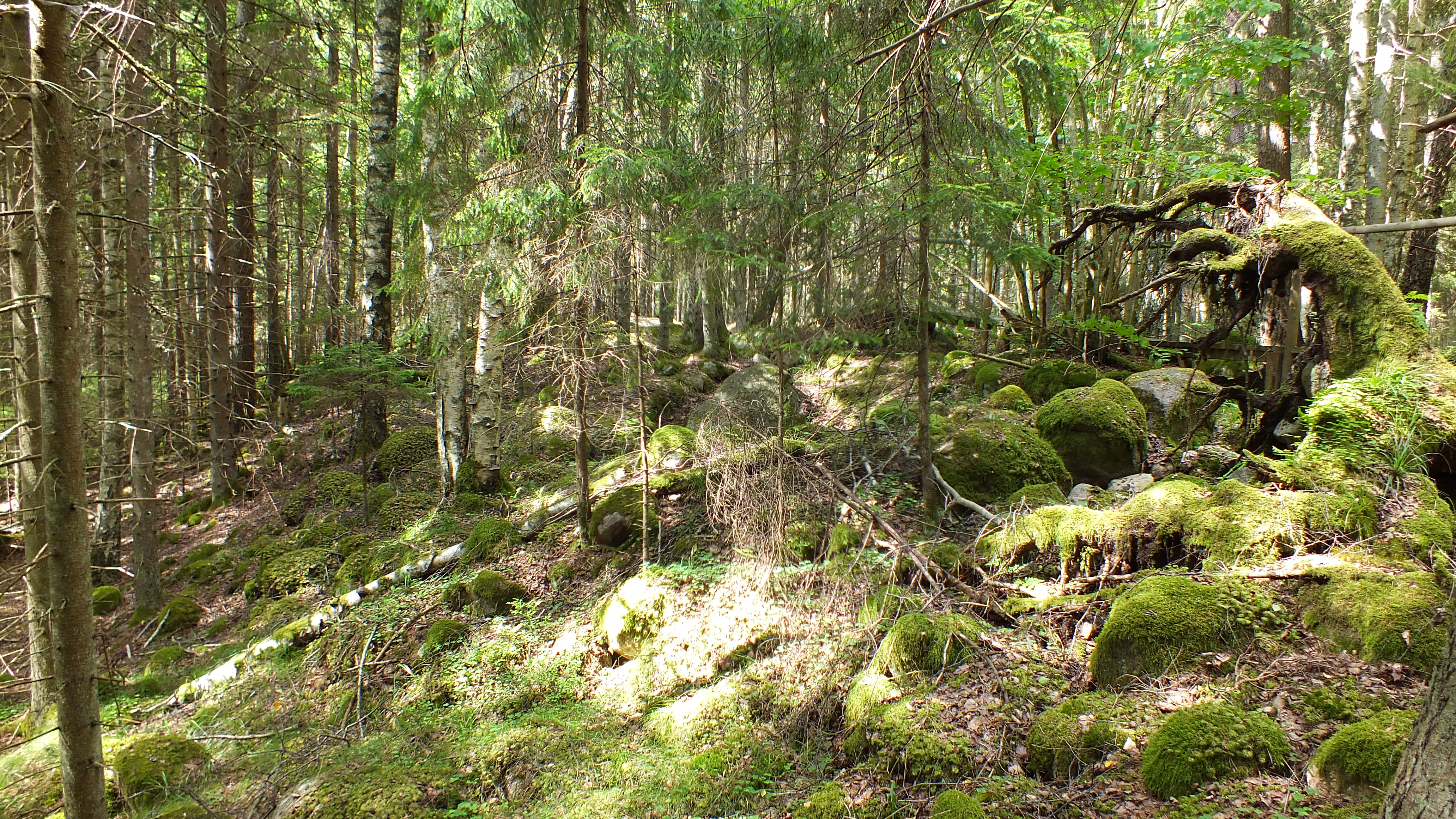 Kārdūžu kalva